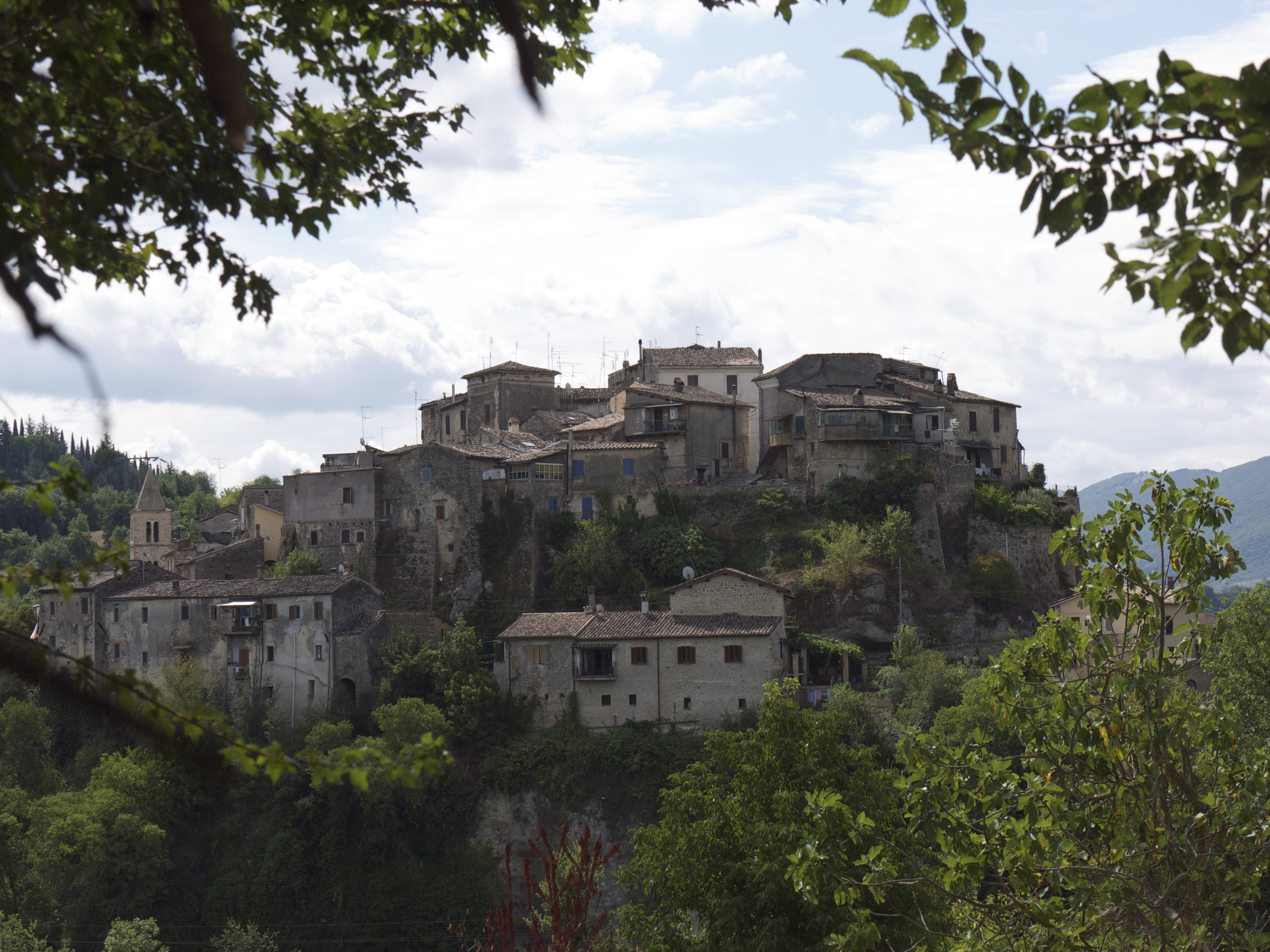 Bocchignano, Lazio, Italia